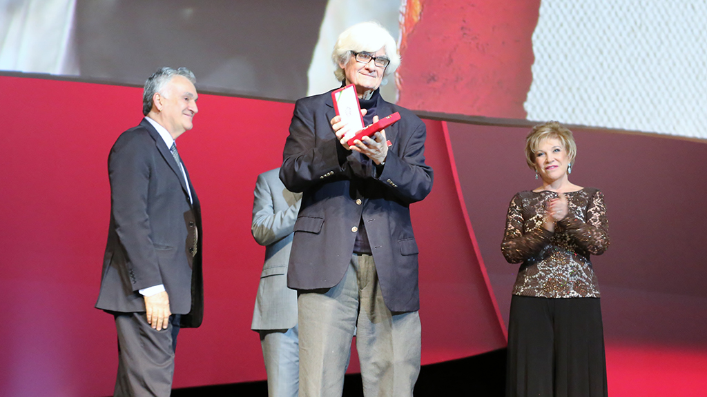 São Paulo (SP) | Ministério da Cultura celebra a Ordem do Mérito Cultural 2013. Na foto: Marlo Nobre recebe a medalha 05.11.2013 Foto: Elisabete Alves